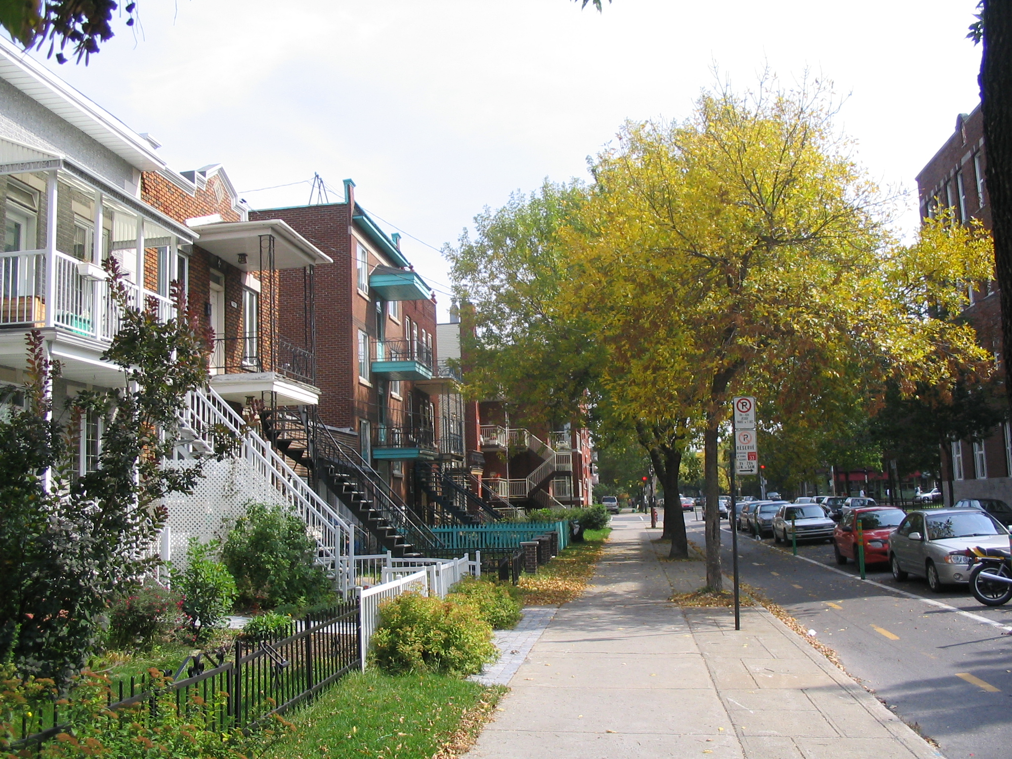 piste cyclable dans le quartier Villeray-Saint_michel-Parc-Extension